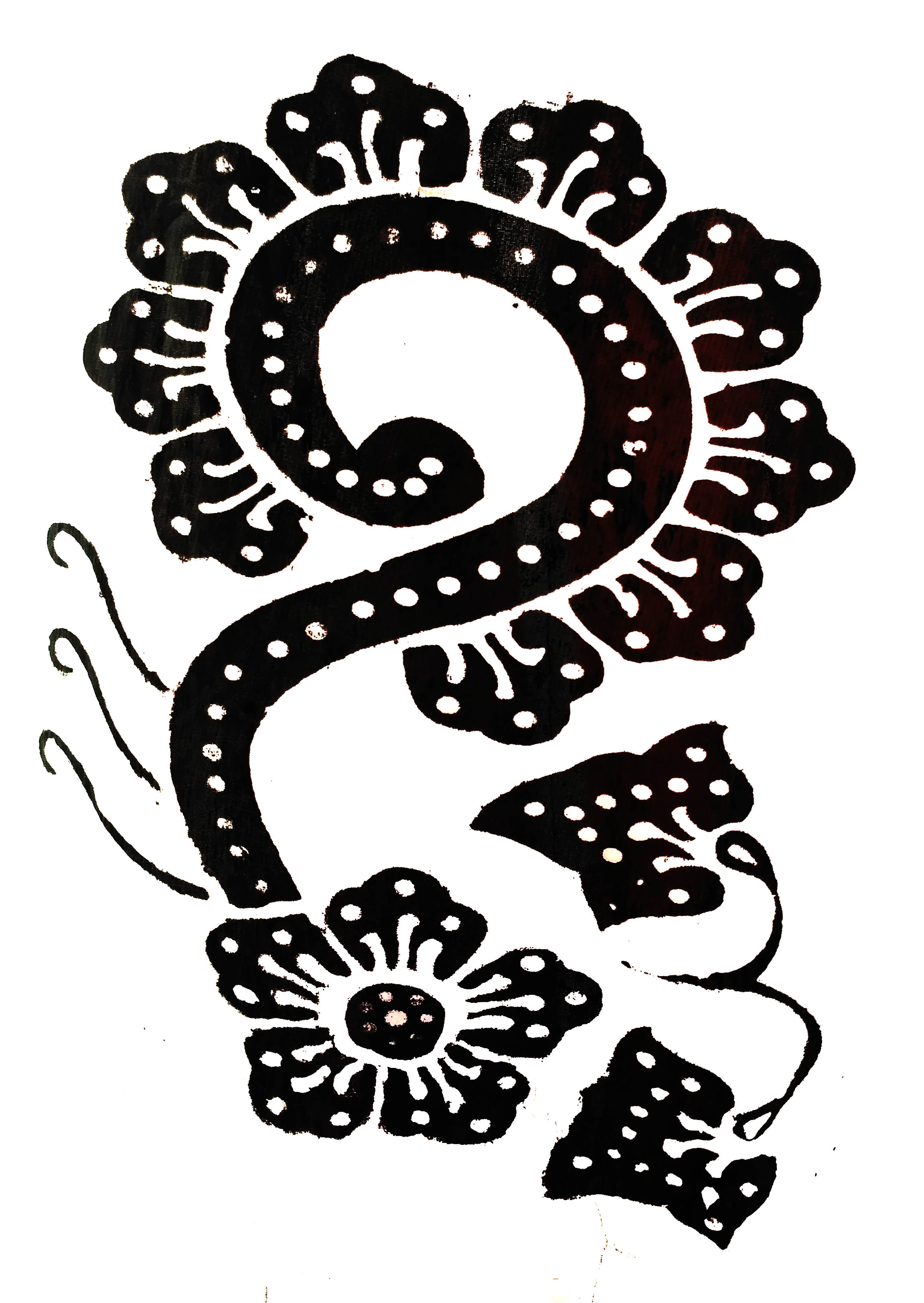 Ragam hias Gajah Oling diambil dari umbul-umbul di Kabupaten Banyuwangi